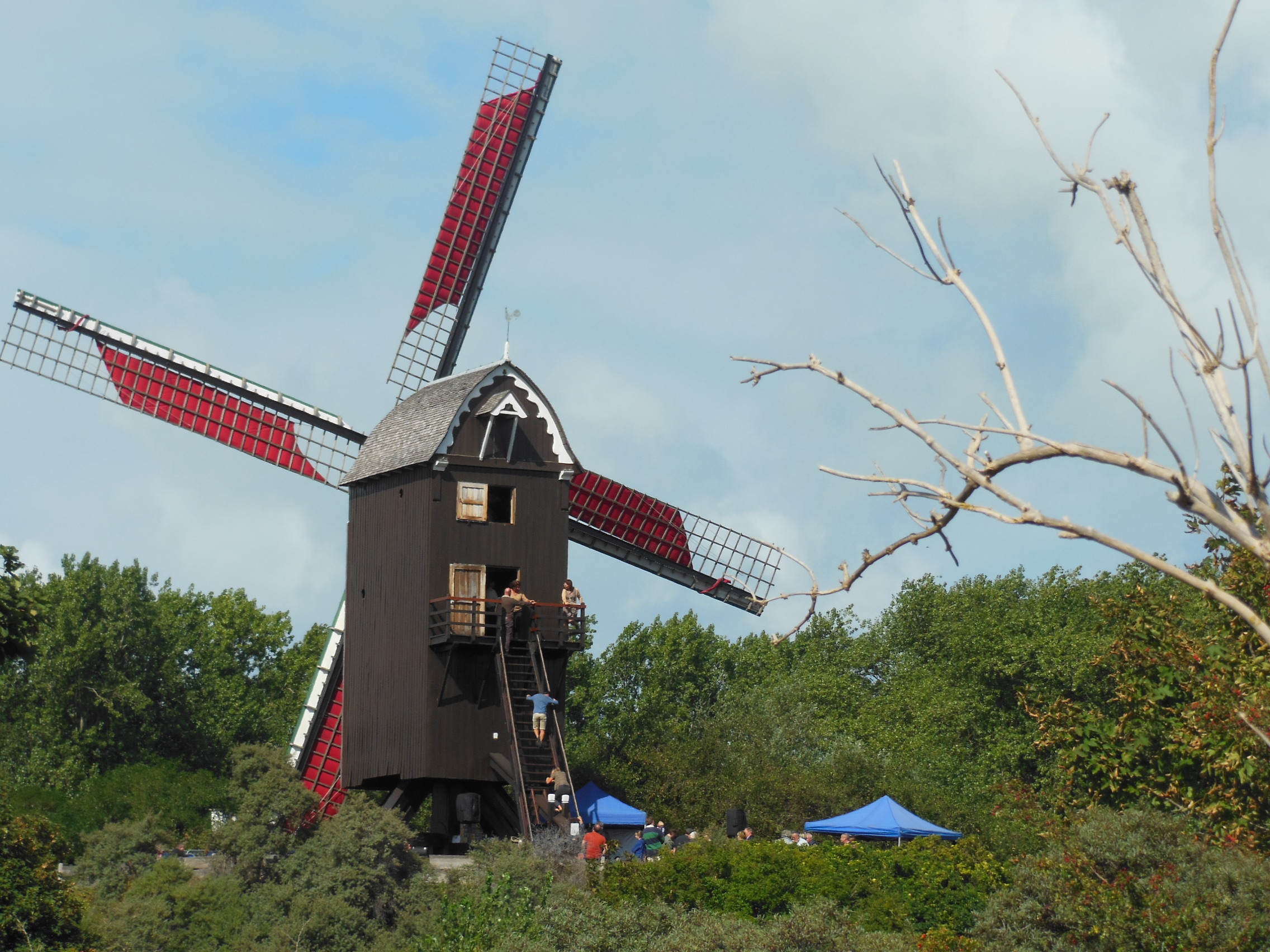 De Zuid-Abdijstaakmolen met draaiende wieken met zeilen en bezoekers tijdens de “Open Monumentendag” op 8 september 2019 Zuid-Abdijmolen, Koksijde